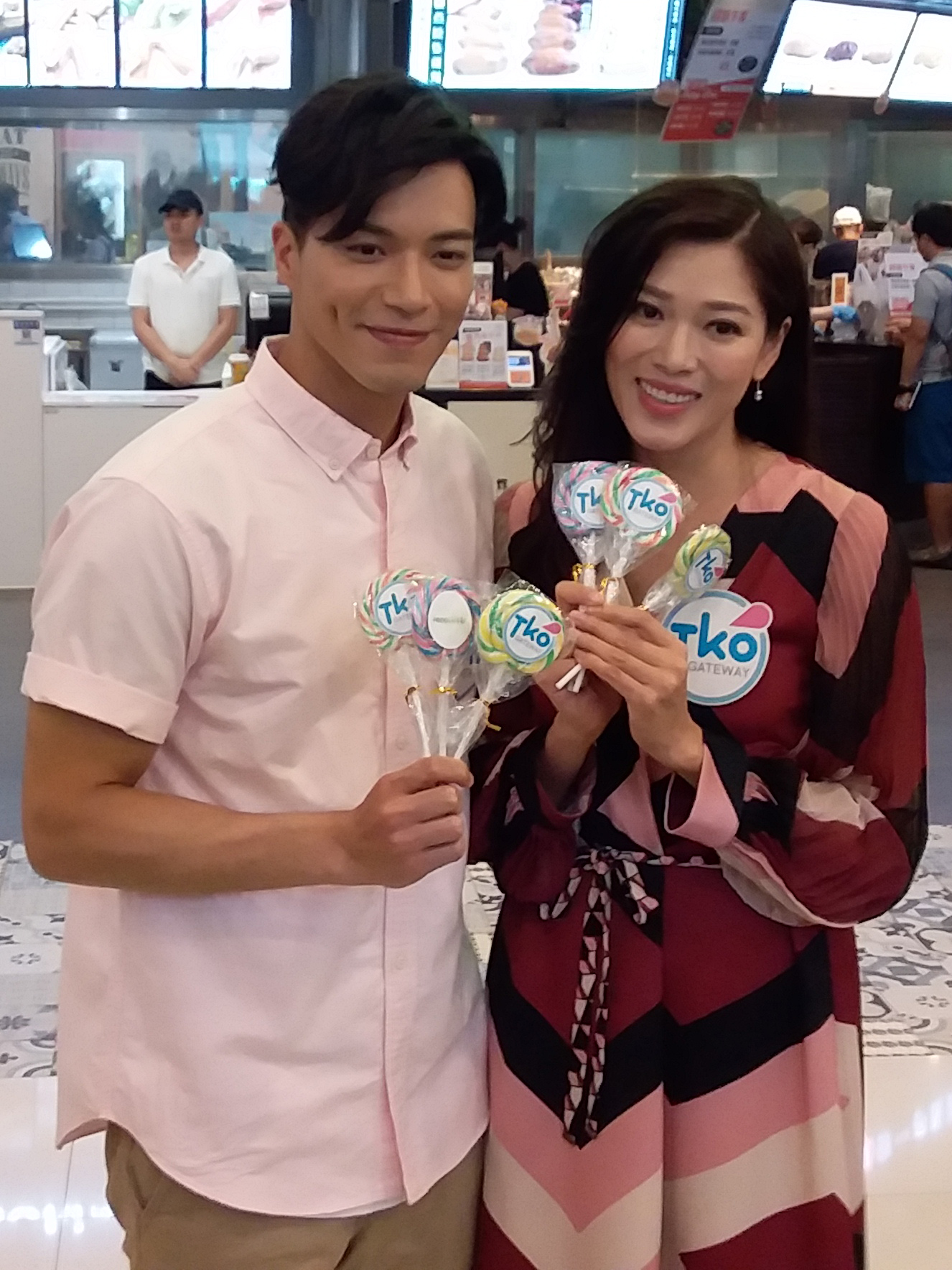 中文（香港）: 在無綫電視處境劇《愛·回家之開心速遞》飾演宋瑞輝的許家傑與飾演龍力蓮的林淑敏，到將軍澳出席TKO Gateway推廣活動。